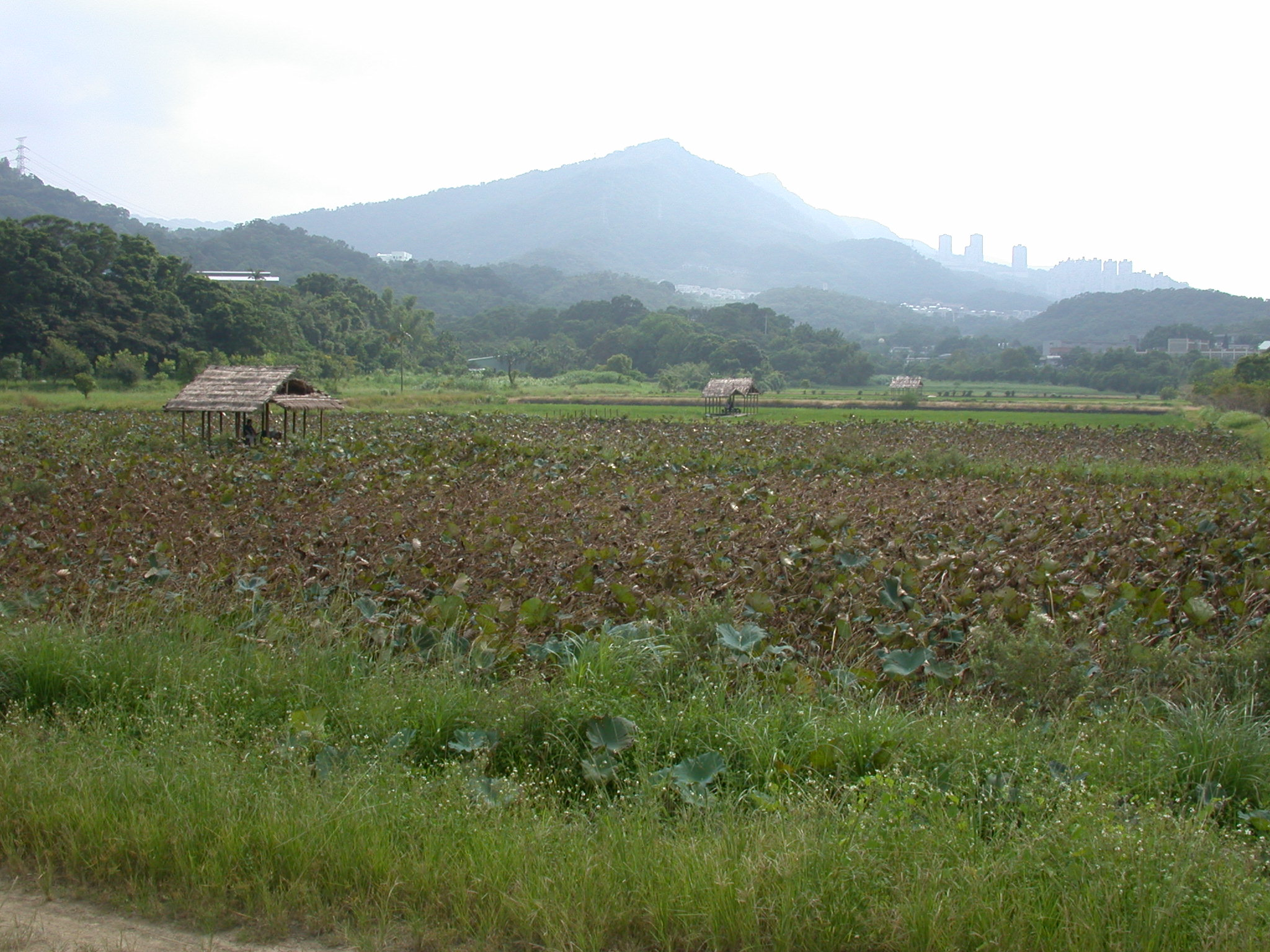 Bân-lâm-gú: 安康分場蓮花池